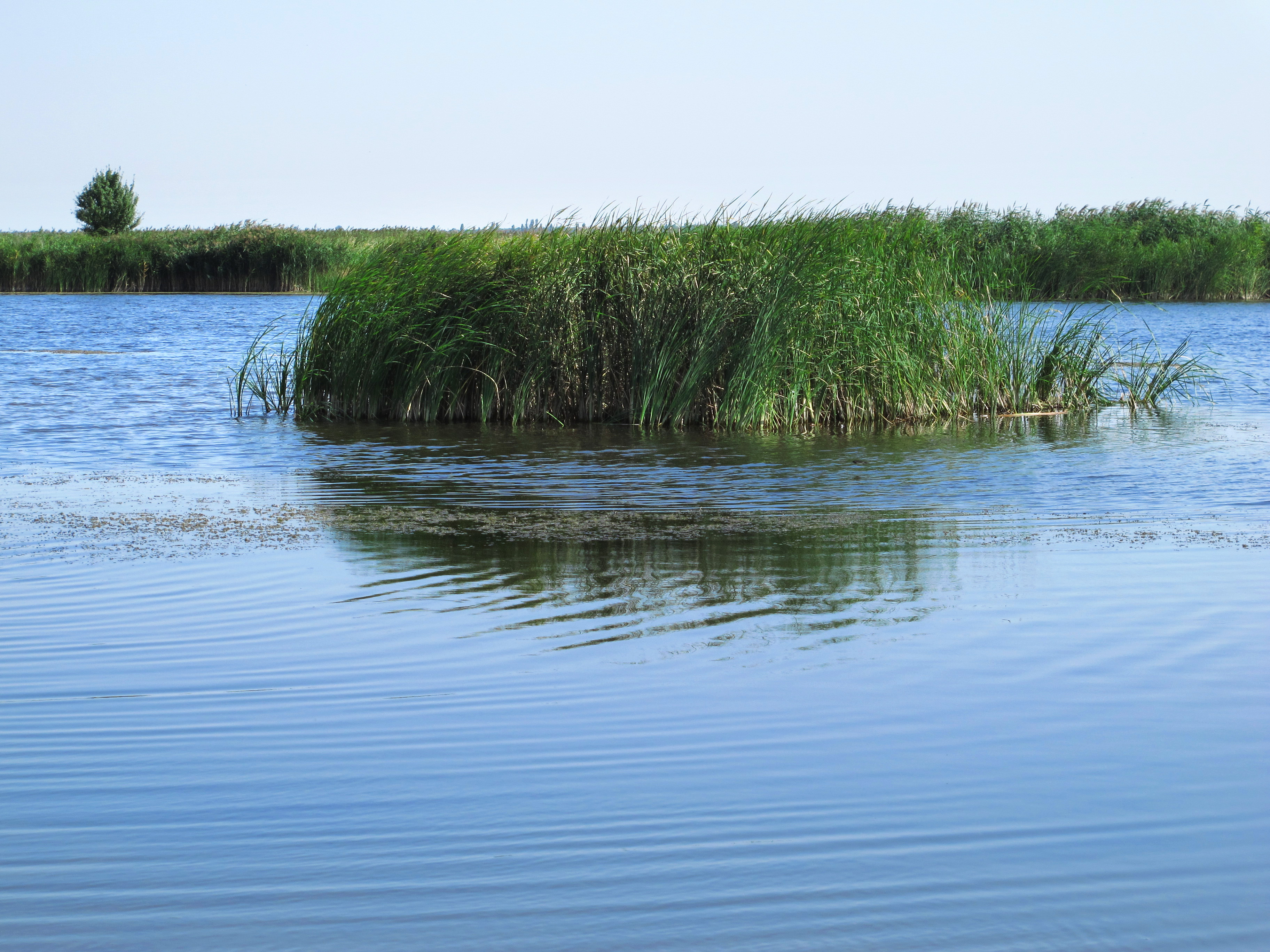 Ландшафтний заказник загальнодержавного значення "Петропавлівські лимани"